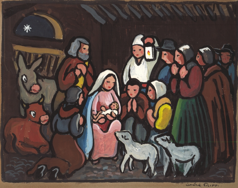 Tableau d'André Filippi représentant une crèche. Libre représentation de l'artiste de ses santons